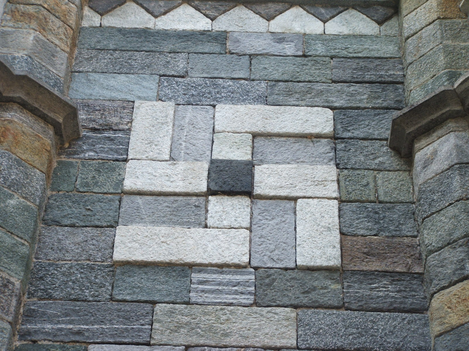 Particolare della Chiesa parrocchiale di Rosazza, in Valle Cervo, provincia di Biella (Piemonte, Italia) - Un segno di svastica realizzato con le pietre sul sopraportico.